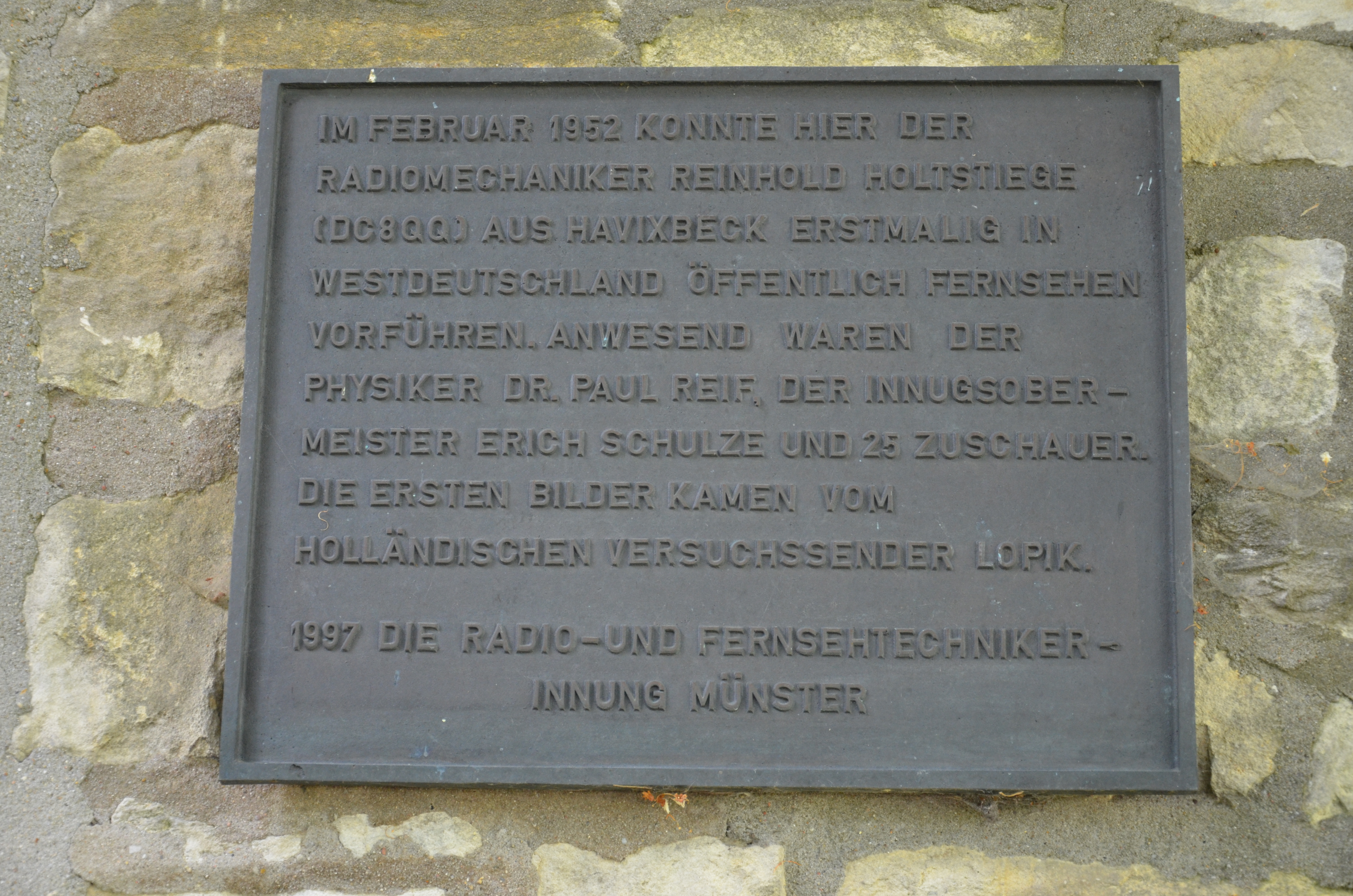 Longinusturm auf dem Westerberg in den Baumbergen im Münsterland Plakette für den ersten Fernsehempfang in Deutschland